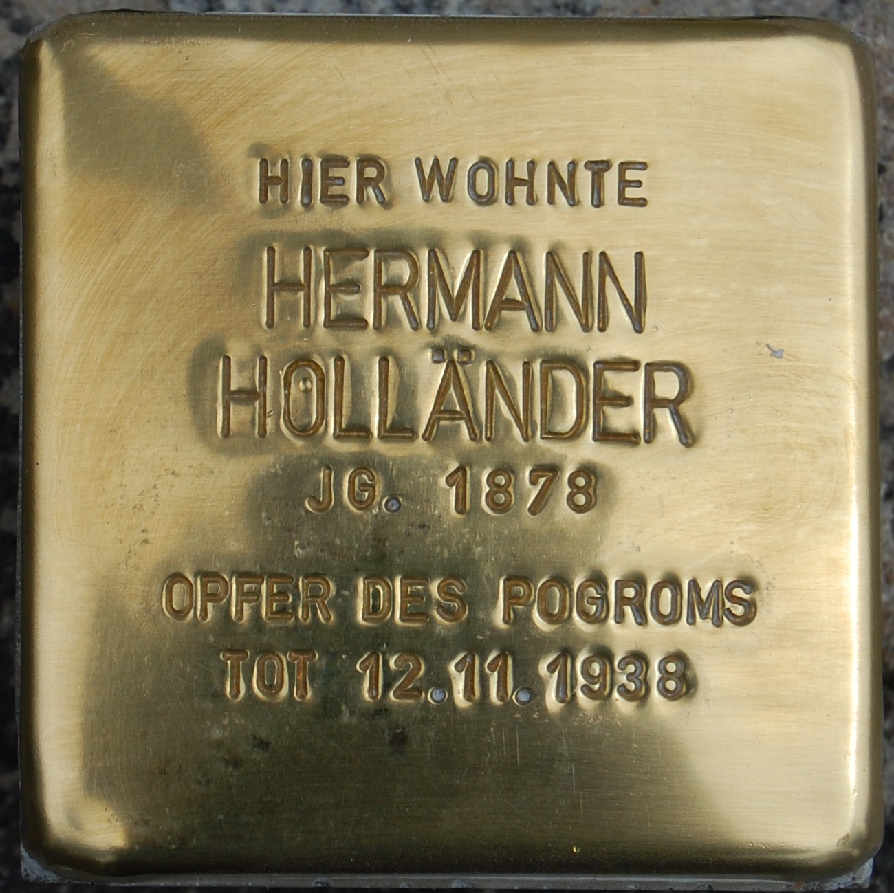 Stolperstein für Kaufmann Hermann Holländer (1878-1938), Maxstraße 24, Bad Kissingen